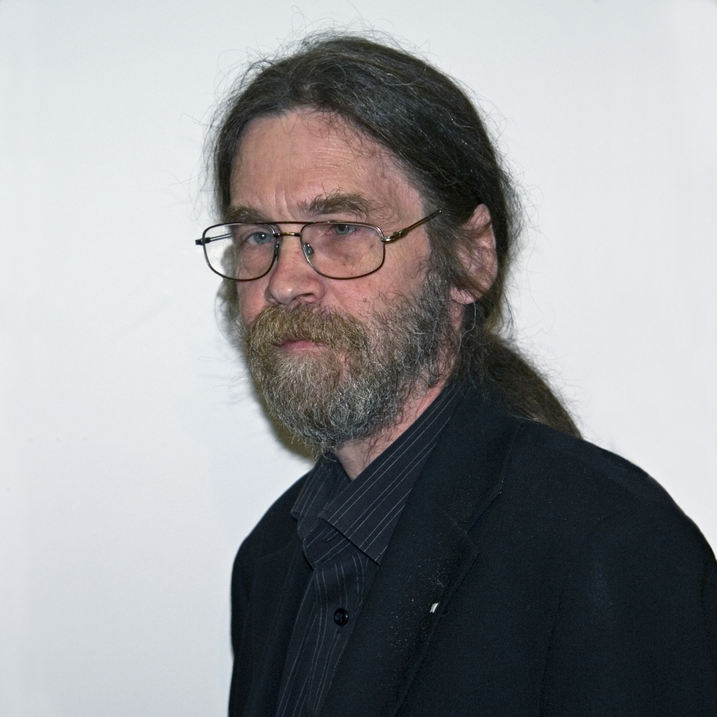 Wolfgang Hohlbein, deutscher Schriftsteller